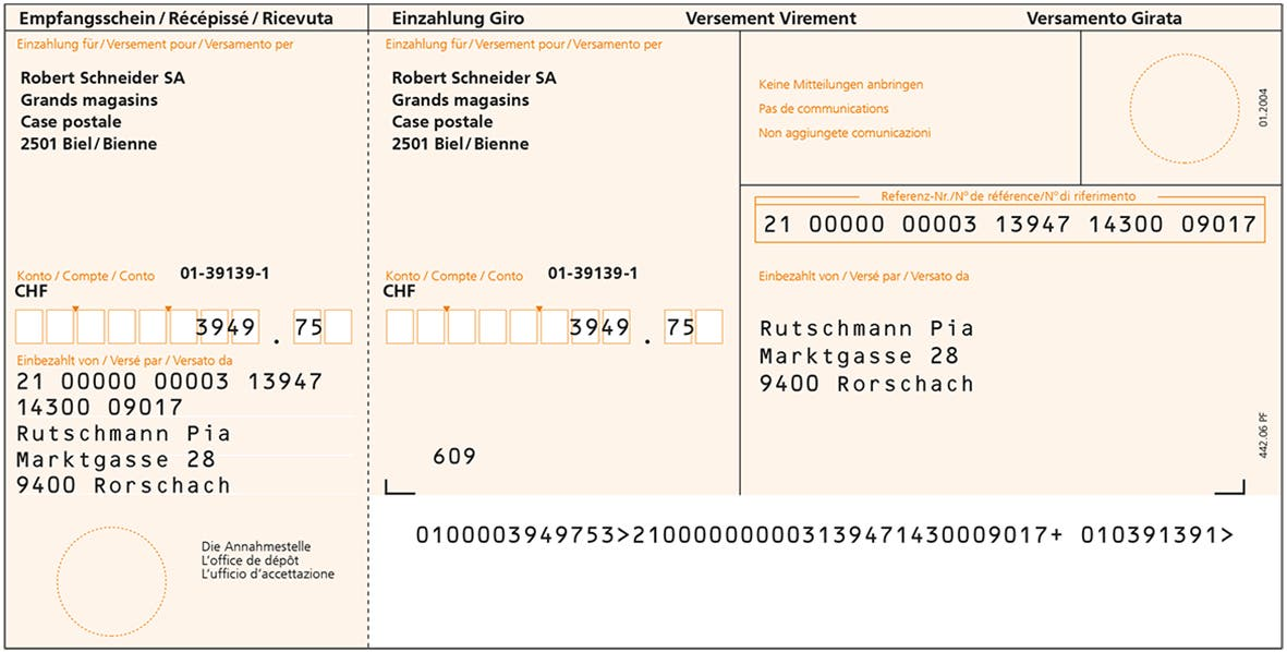 oranger Einzahlungsschein (Schweiz)